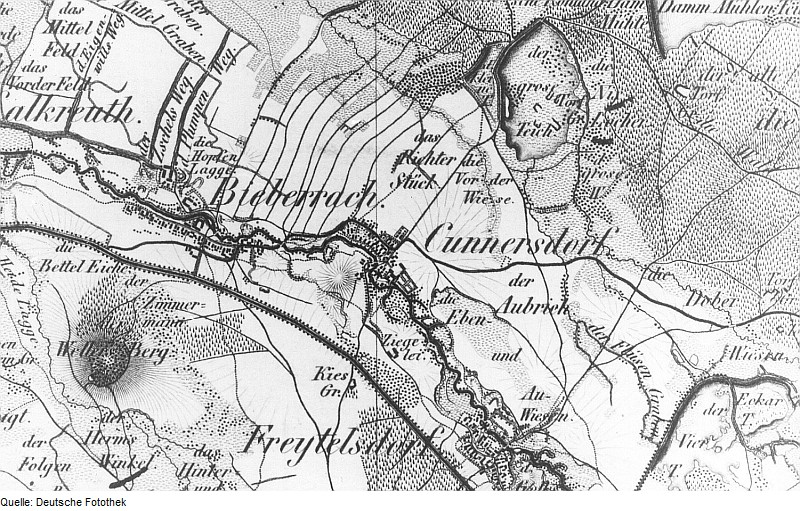 Original image description from the Deutsche Fotothek Ebersbach-Cunnersdorf. Oberreit, Sect. Großenhain, 1841/43